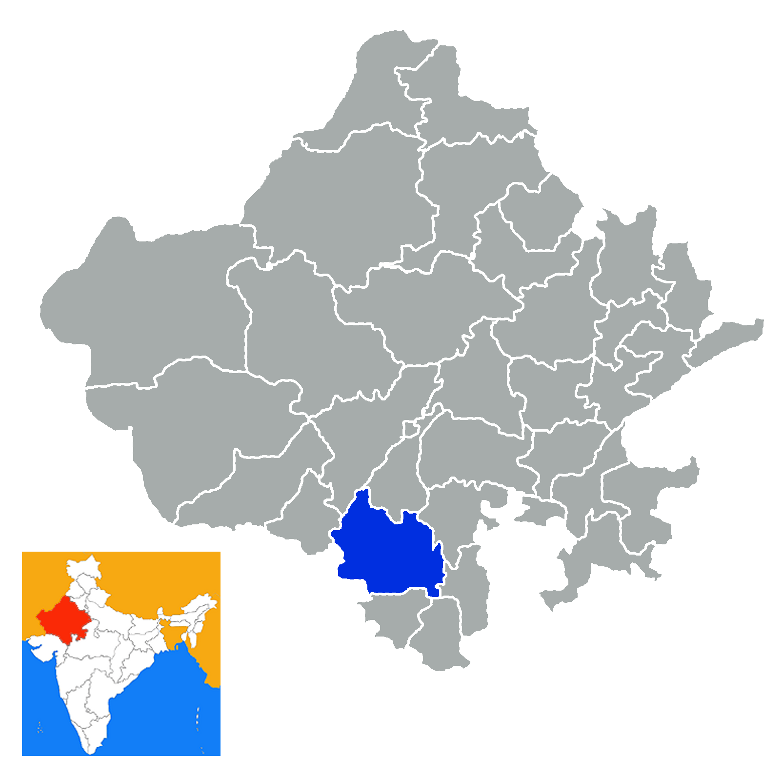 Dikstrito de Uidapur Rajastan India